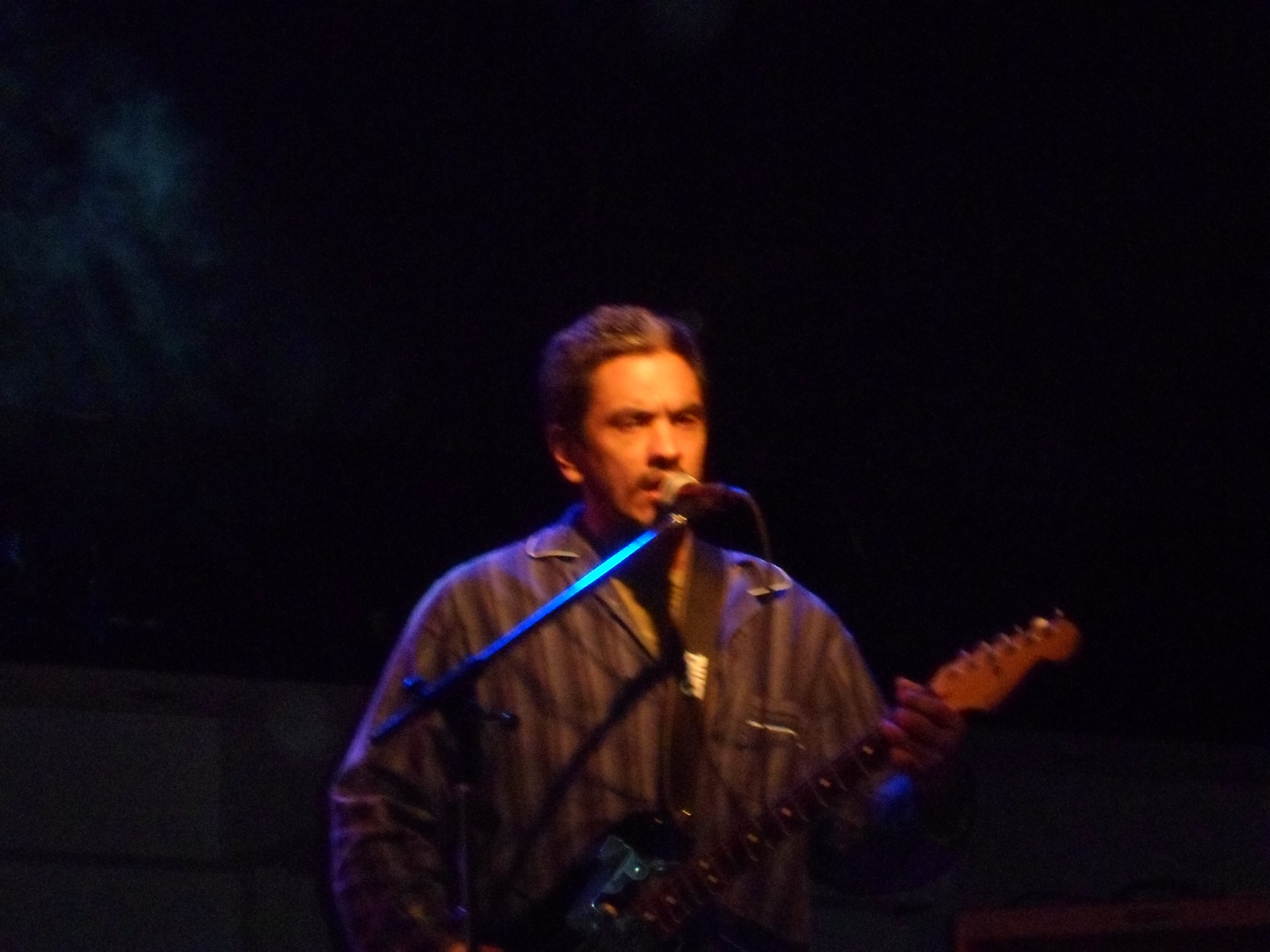 esta foto fue tomada en un recital de Bersuit Vergarabat donde Alberto Verenzuela es guitarrista